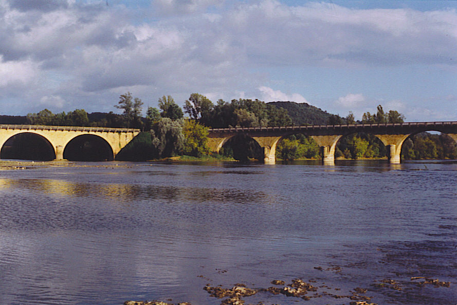 self made